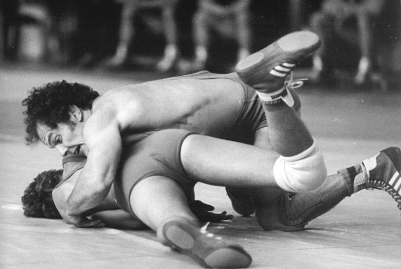 Hartmut Reich ADN-ZB 15.8.82 Edmonton: Gold für Hartmut Reich Durch ausgezeichnetes technisch-taktisches Können und großartigen Kampfgeist wurde zum Abschluß der 21. Ringer-Weltmeisterschaften im Freien Sil in Edmonto der Jenaer Hartmut Reich (Fliegengewicht) neuer Titelträger. Foto vom Training vor der Weltmeisterschaft.